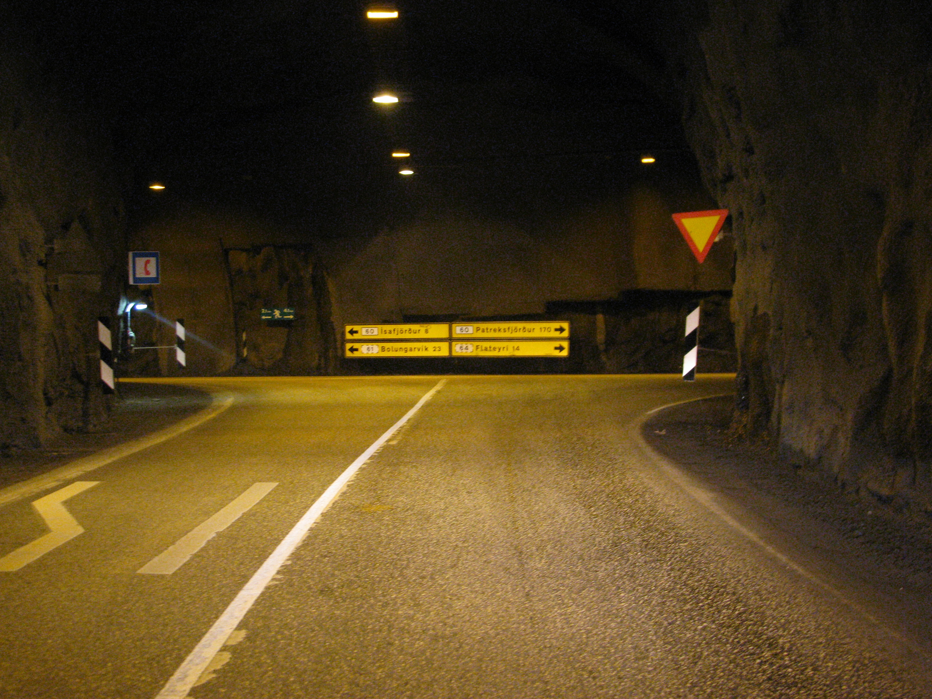 In the Vestfjarðargöng